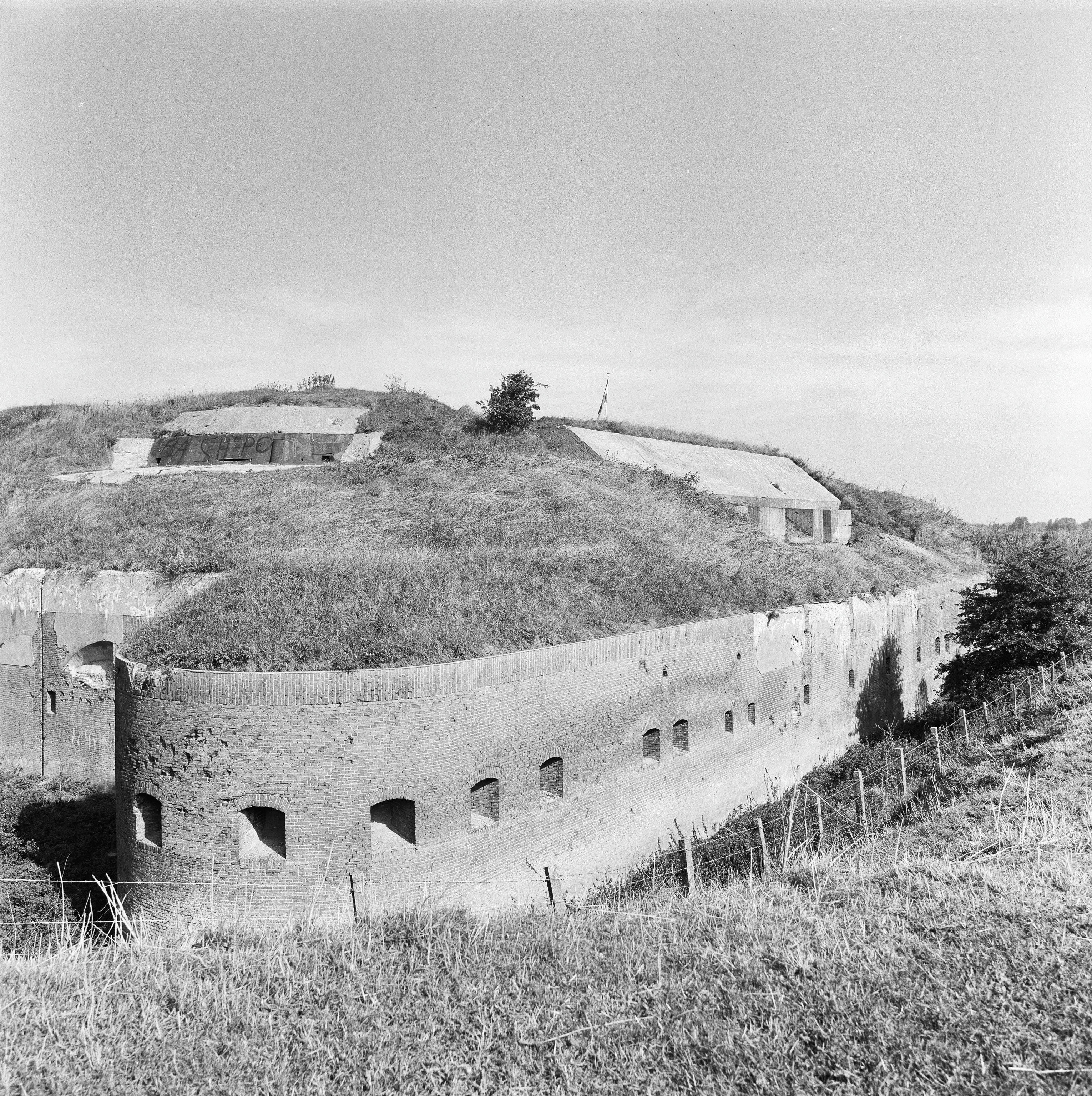 Fort Pannerden: Overzicht